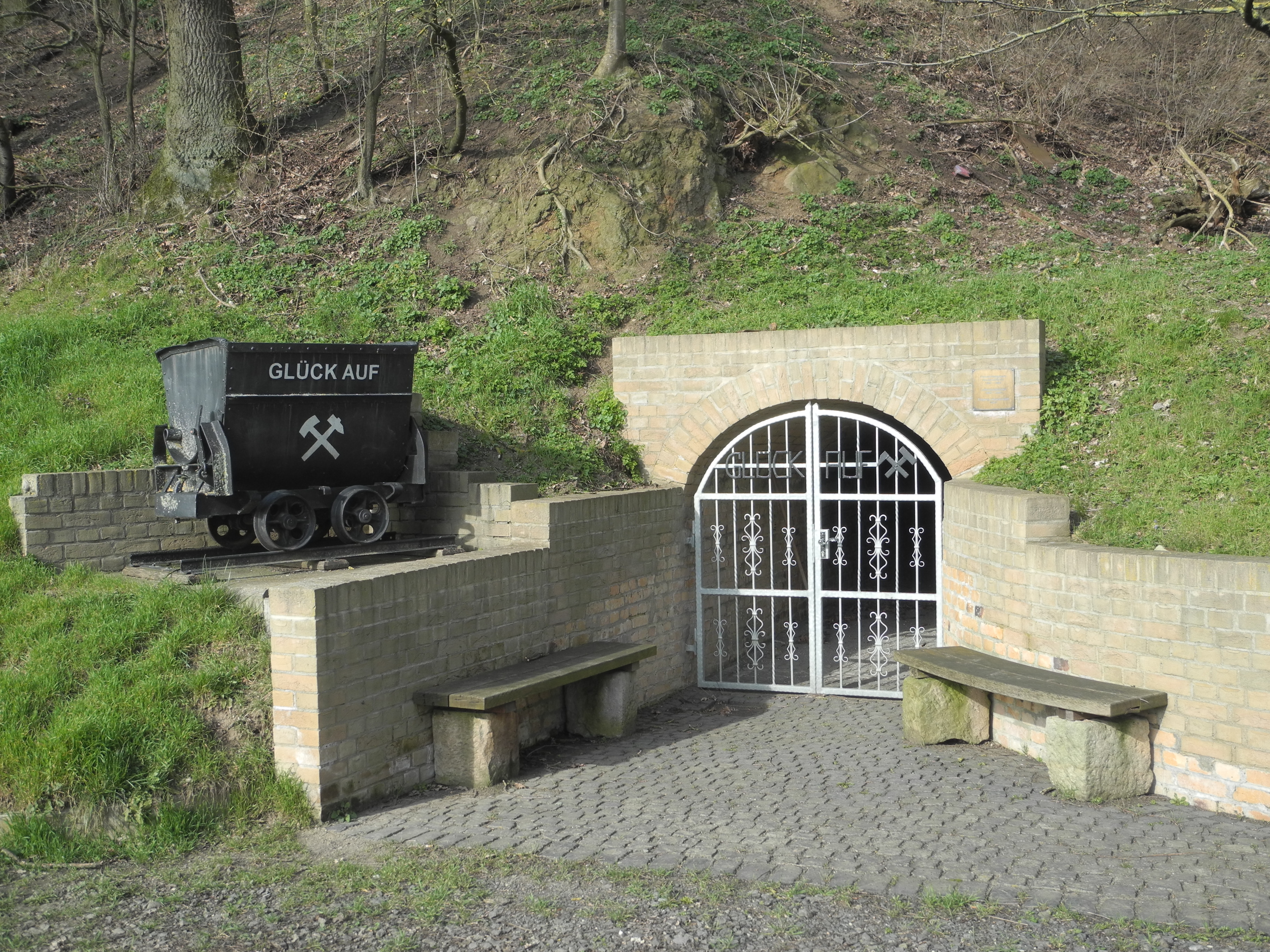 Das ehemalige Eisenerzbergwerk Niedermöllrich westlich von Niedermöllrich, östlich von Fritzlar im Schwalm-Eder-Kreis, Hessen, Deutschland.